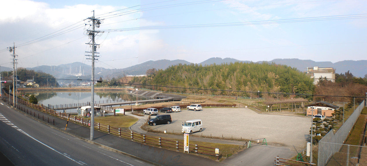 愛知県小牧市にある鷹ヶ池フィッシング場のパノラマ写真（ソフトウェアにて合成）。